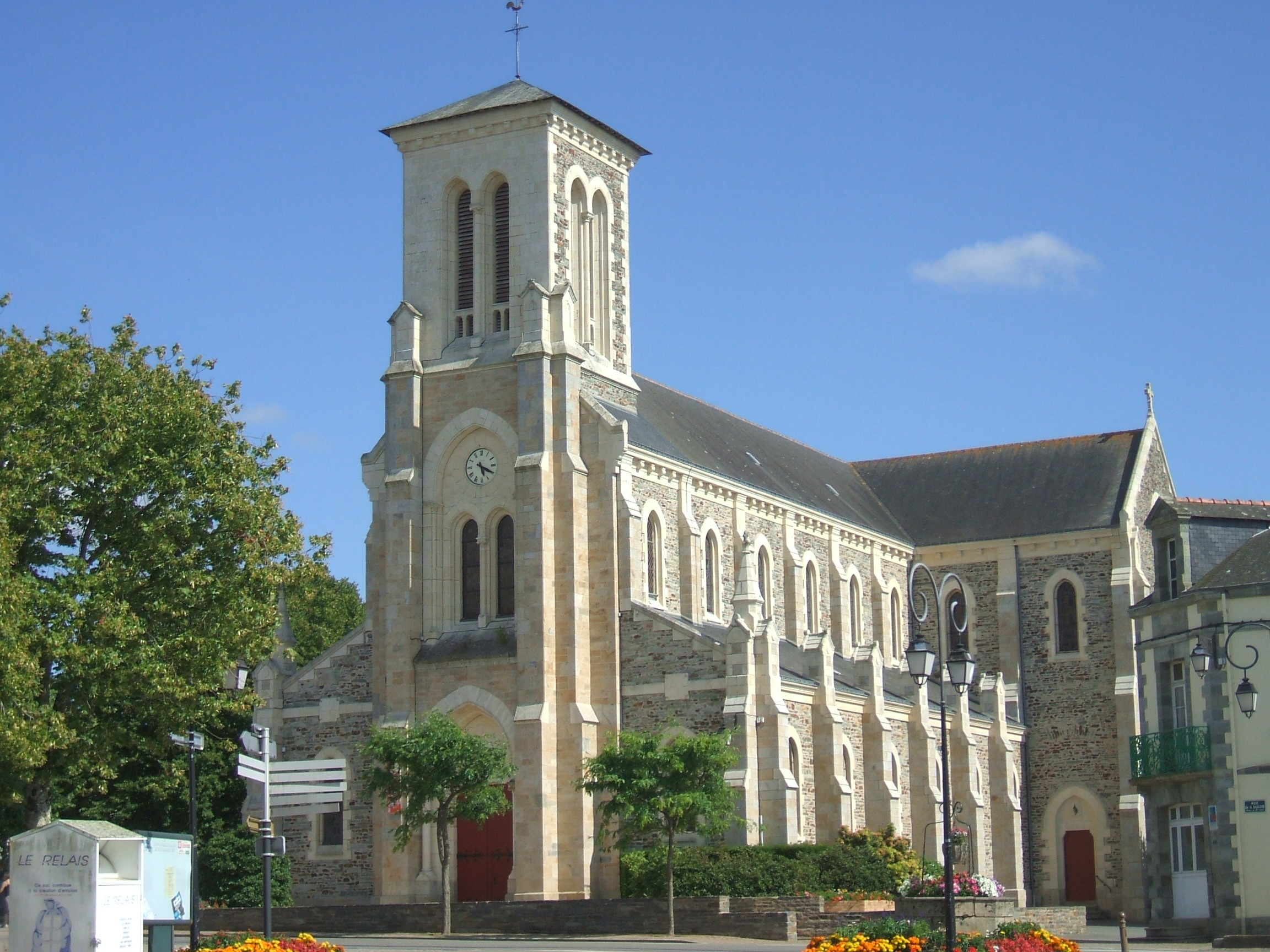 Église de Sixt-sur-Aff datant du fin 19ème.